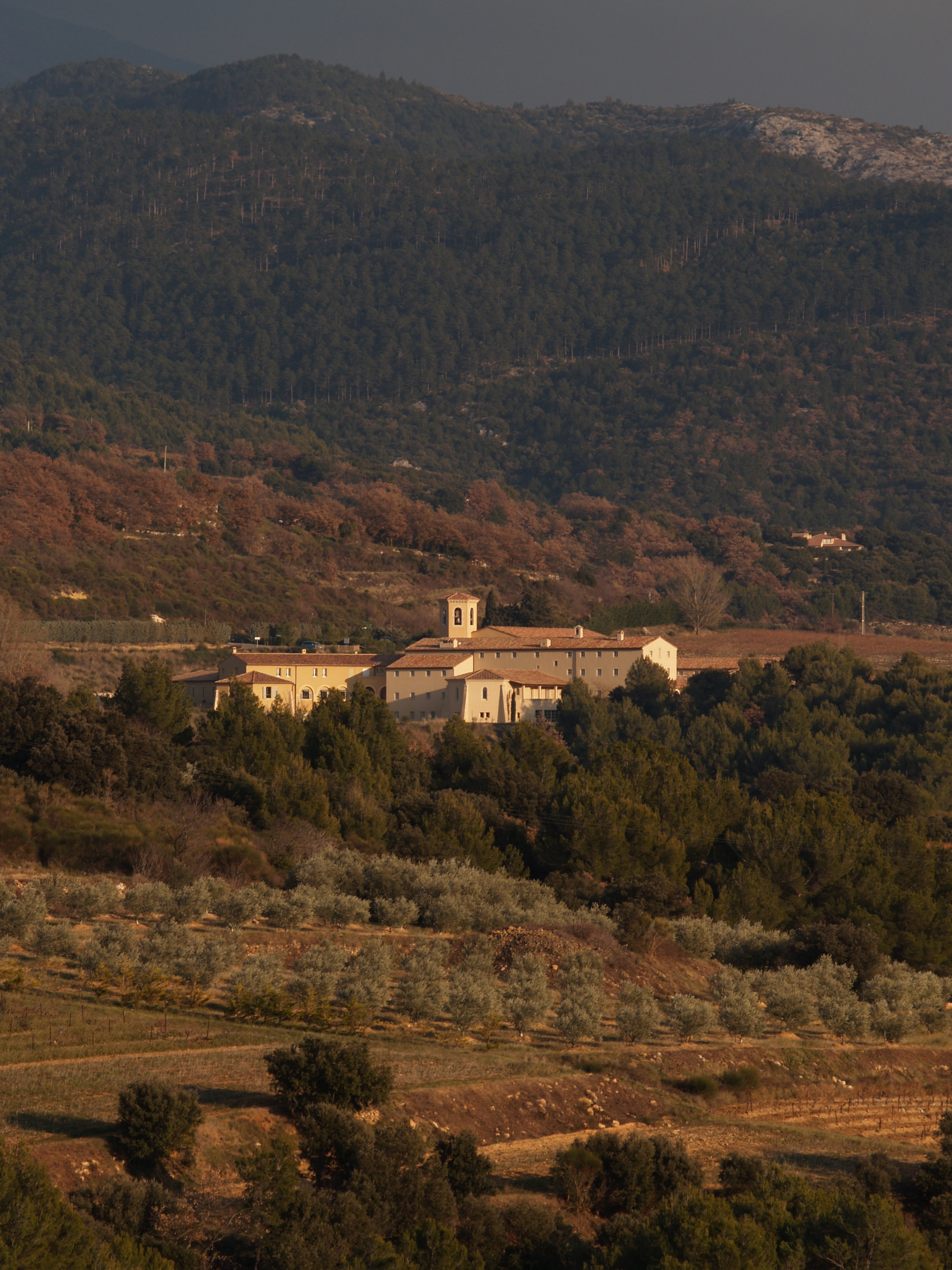 pris par moi même en décembre 2005 Bigor